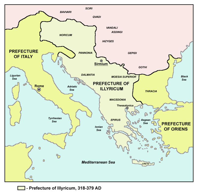 Prefecture of Illyricum map(1)